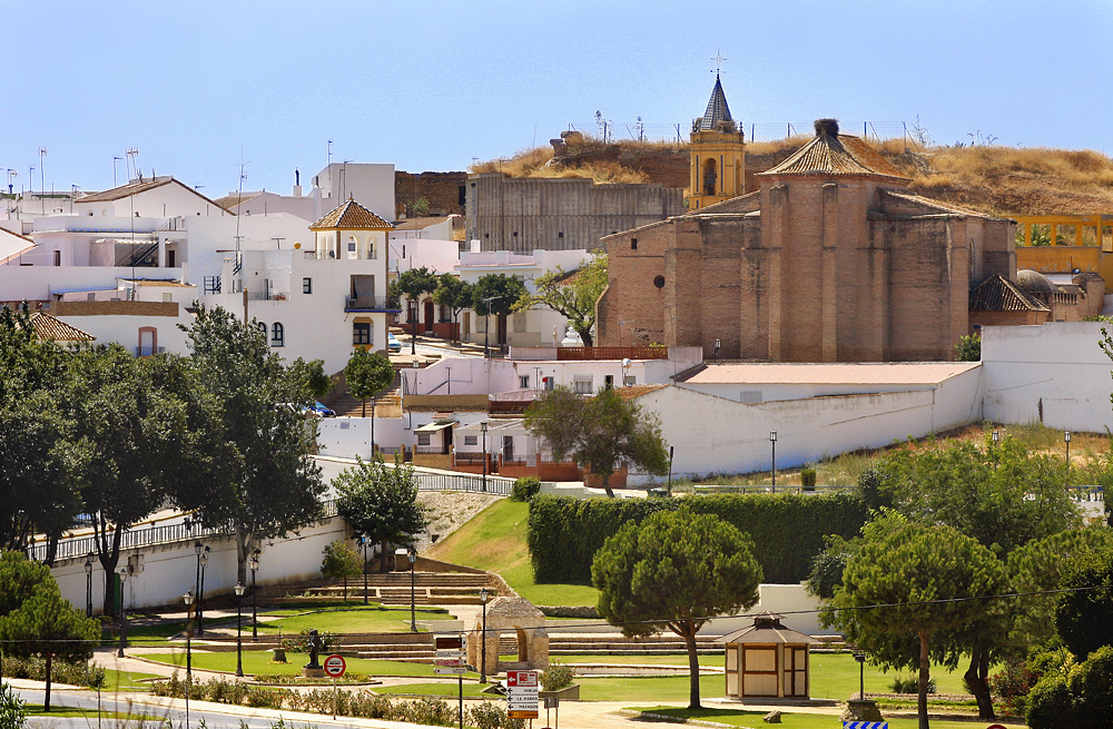 Vista diurna de Palos de la Frontera.